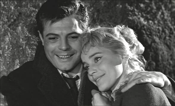 Screenshot del film Le notti bianche (1957) di Luchino Visconti.